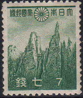 日本が発行した7銭普通切手。描かれているのは当時日本の植民地だった朝鮮半島の景勝地クムガンサンである。